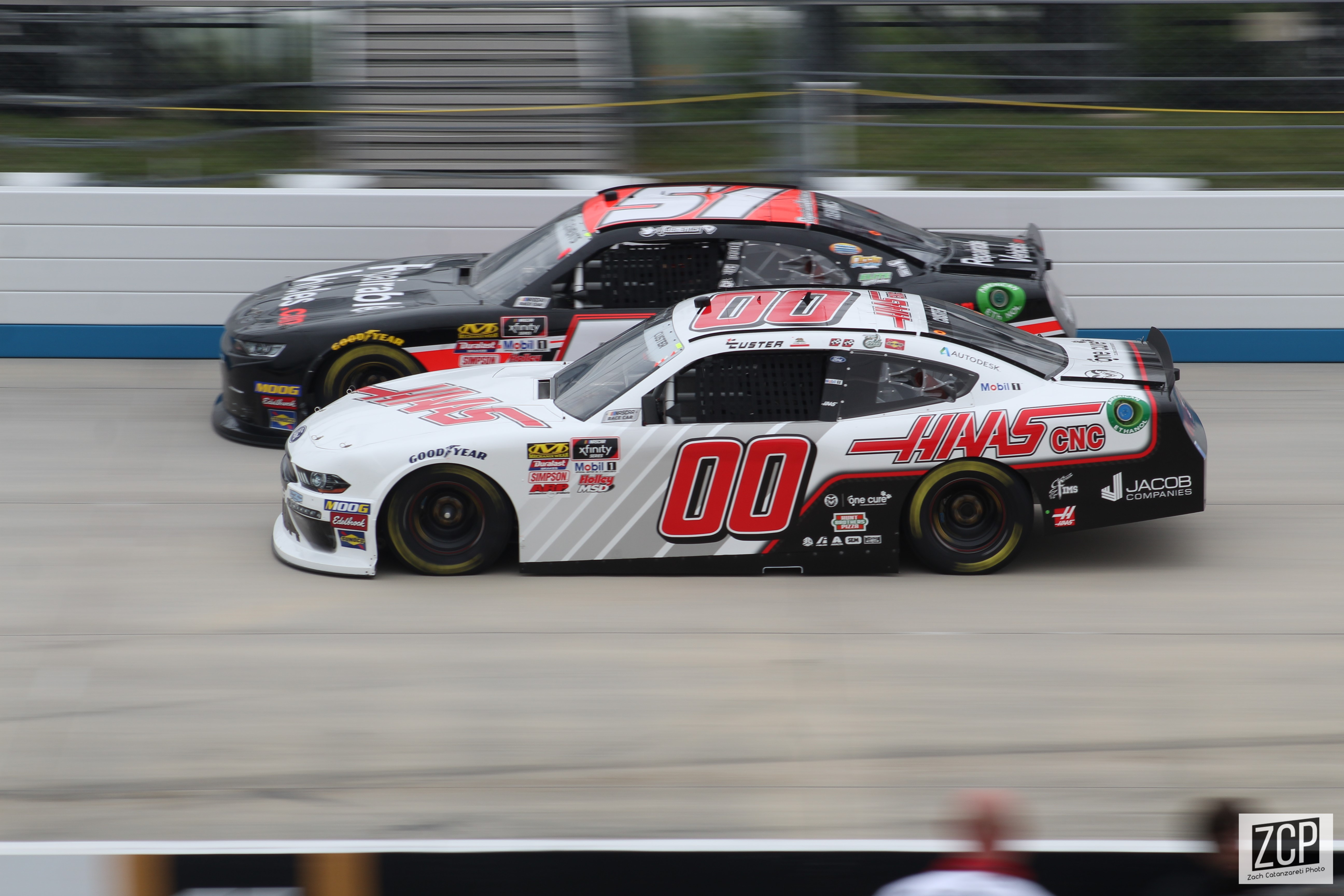 2019 Gander RV 400